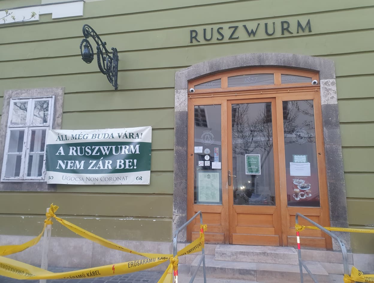 Az "Ugocsa non coronat" felírat a plakáton ezúttal arra utal, hogy a legtöbb (Ruszwurmnál többnyire nagyobb) vendéglő és cukrászda országszerte be volt zárva.